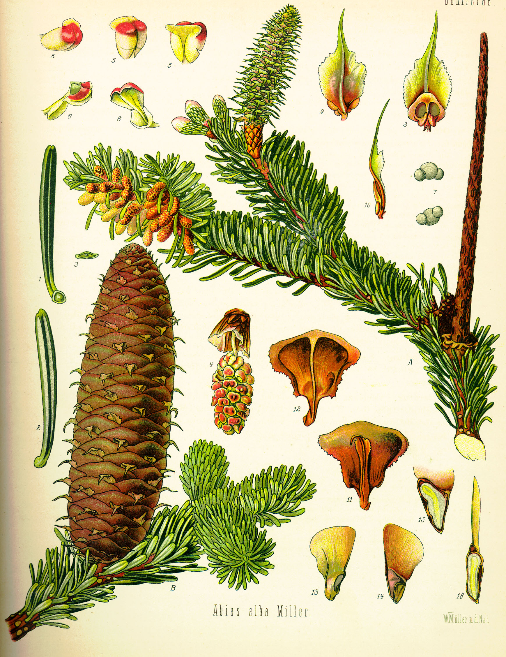 Planche botanique n° I-54 de l'"Atlas des Plantes médicinales de Köhler en images réalistes avec brèves notes explicatives" consacrée au sapin blanc. Légende : A Branche avec une fleur mâle, une fleur femelle et de jeunes cônes, taille réelle ; B Branche avec cône mûr (pomme de pin), idem ; 1 & 2 Aiguille, sous ses deux faces, grossie ; 3 Idem, en coupe transversale, idem ; 4 Chaton mâle, idem ; 5 & 6 Étamines fermées et ouvertes, idem ; 7 Pollen , idem ; 8, 9 & 10 Écaille de bractée sous divers angles, idem ; 11 & 12 Écaille de graine avec écaille de bractée et graines, sous divers angles, idem ; 13 & 14 Graine ailée, sous ses deux faces, idem ; 15 & 16 Idem, en coupe selon deux axes, idem.